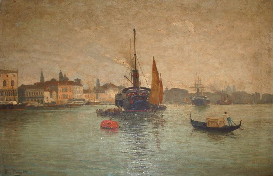 Dampfschiffe vor Venedig, Ölgemälde von Richard von Hagn (1850-1933), 1891, 45 x 60 cm, Privatbesitz